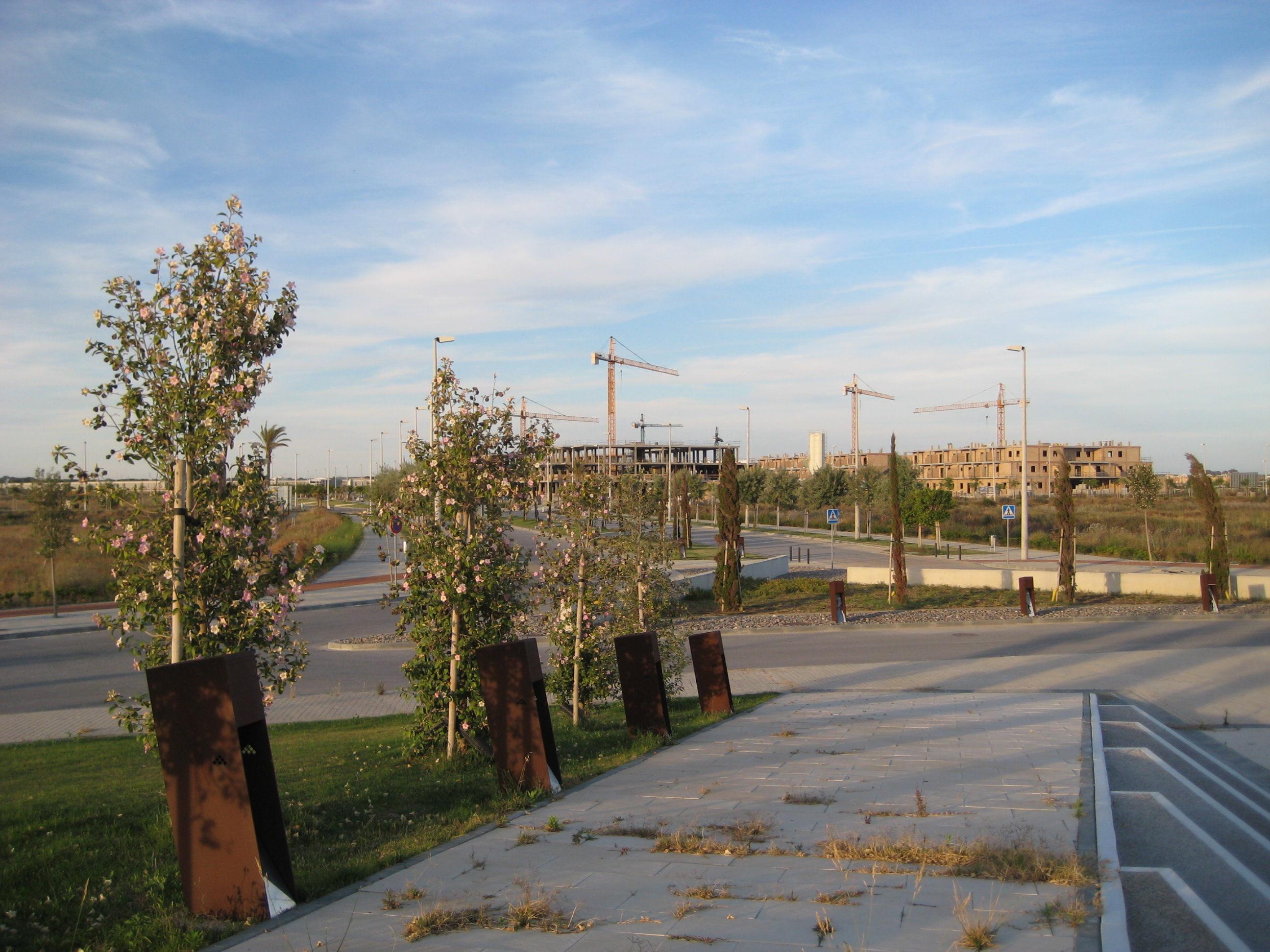 Segunda fase (en contrucción) de Costa Ballena, perteneciente al municipio de Chipiona (Cádiz)